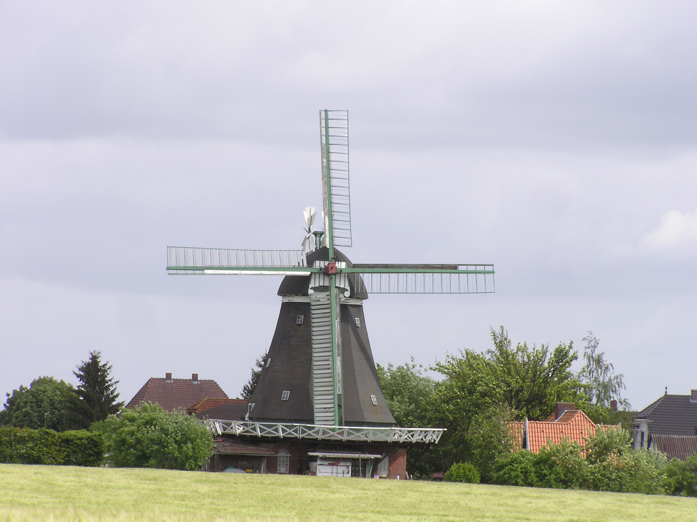 Windmill Siebenbäumen,SH,Germany